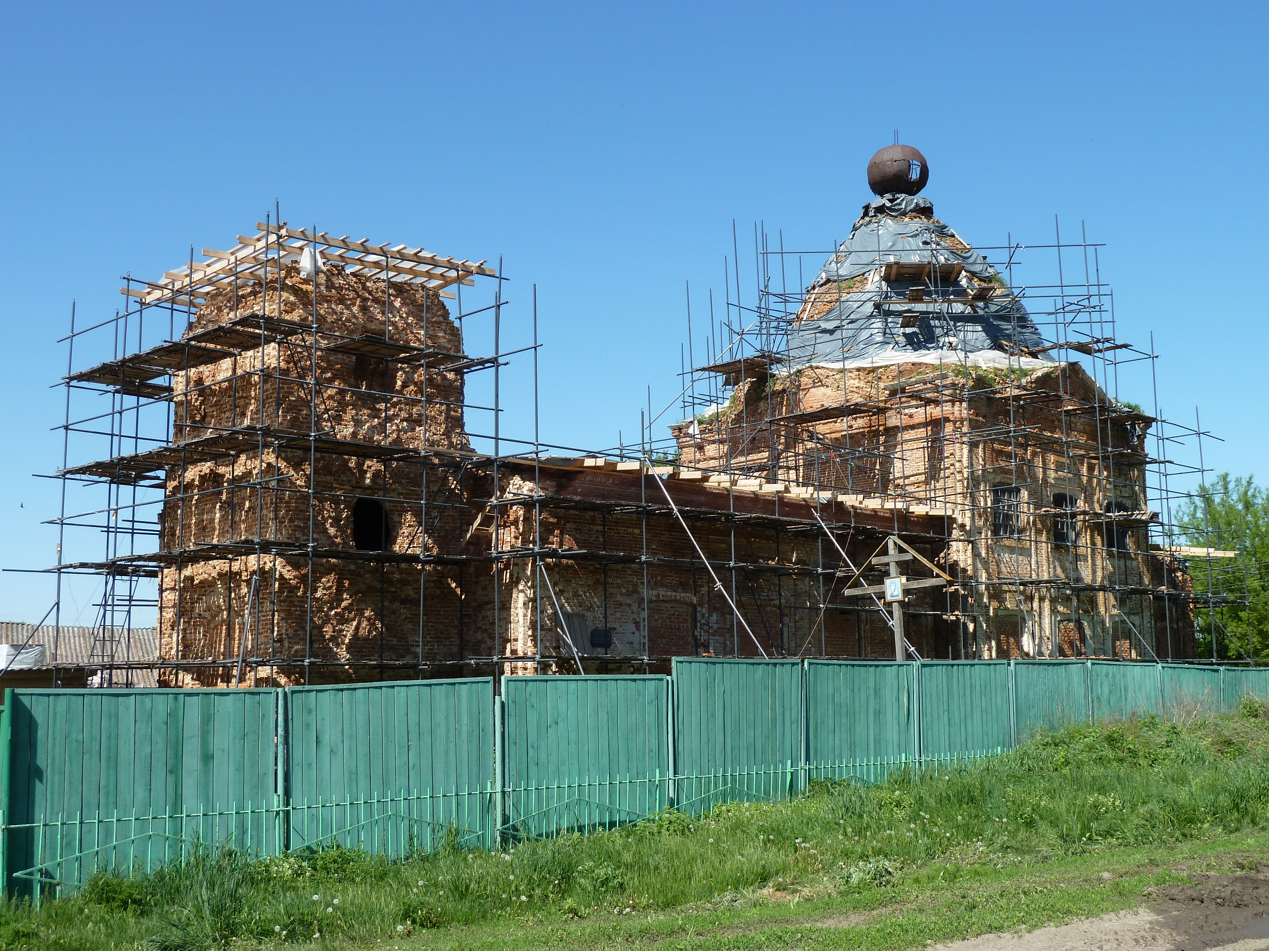 Восстановительные работы Казанской церкви (май 2019)